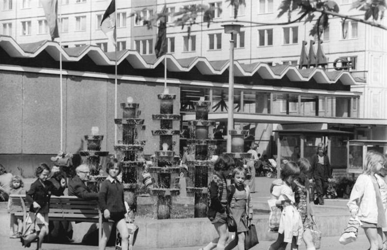 ADN-ZB-Stark 11.5.76 Berlin: Vor der Kaufhalle in der Frankfurter Allee.